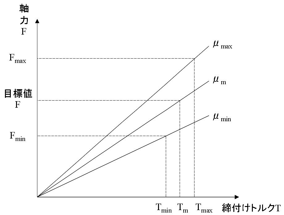 Unevenness about torque control method